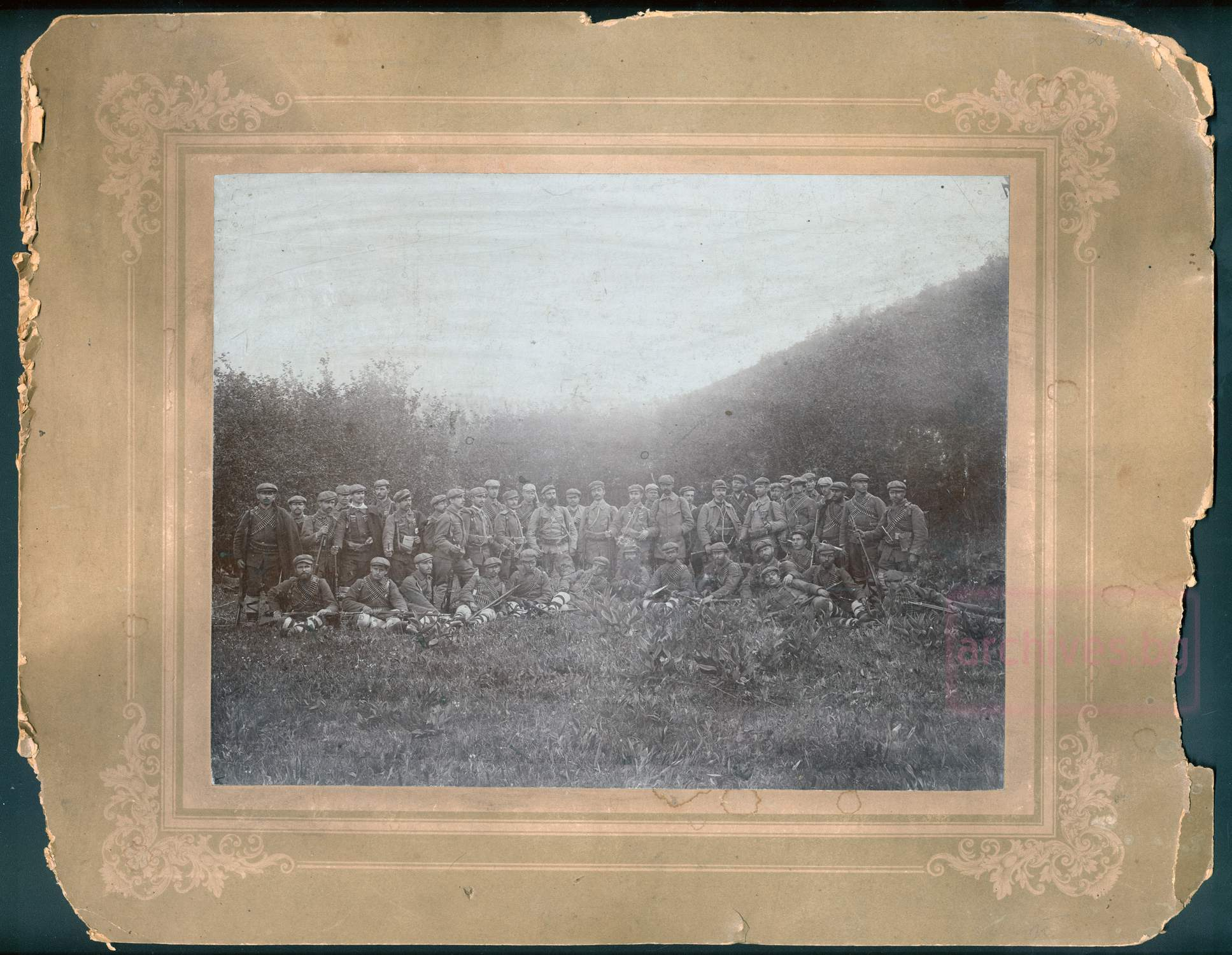 Cheta of IMARO voevoda Yane Sandanski